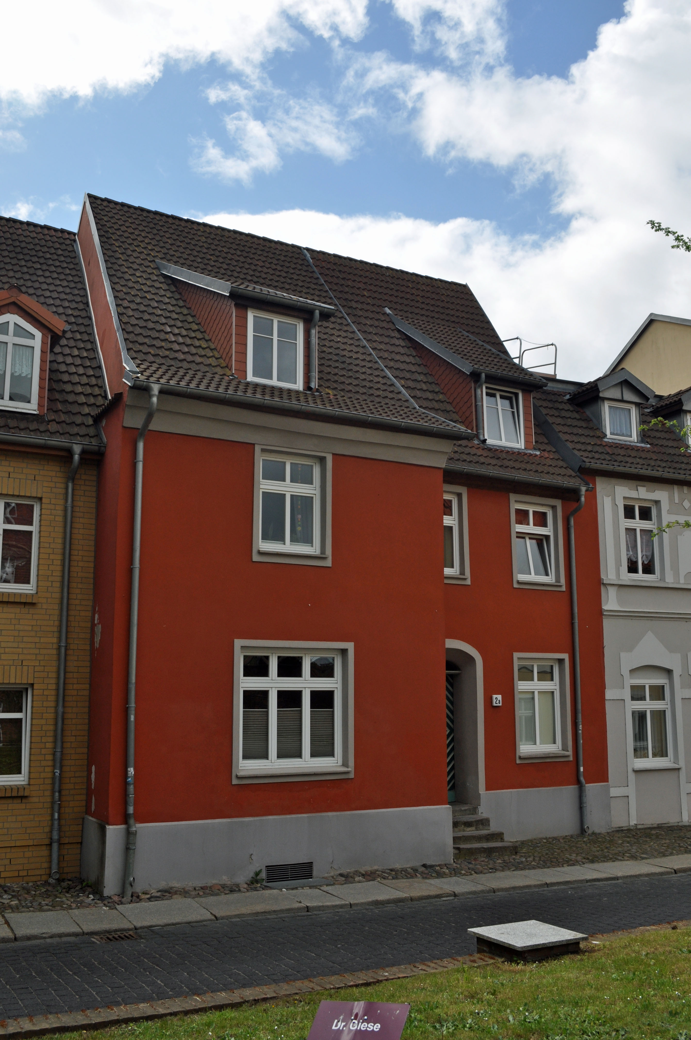 Gebäude in Stralsund, siehe Dateiname